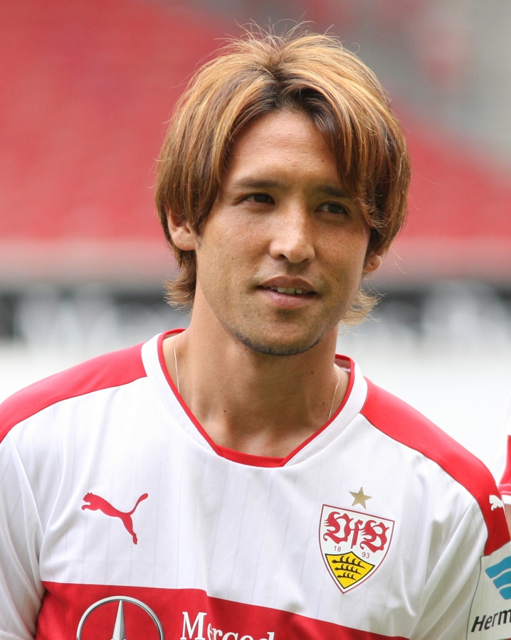 Hajime Hosogai beim SaisonOpening des VfB 2016. Aufgenommen von